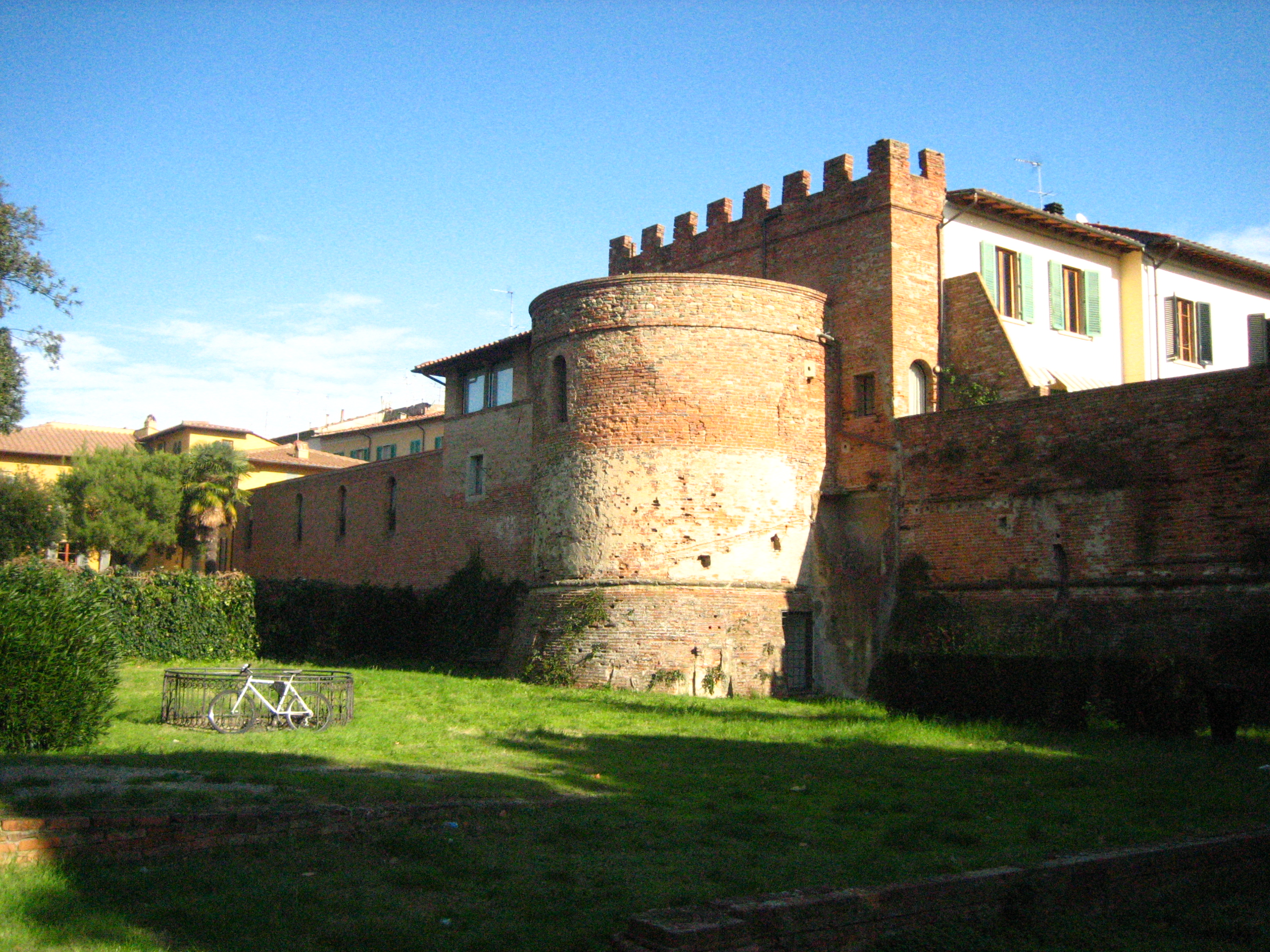 Monumento e mura. Il torrione si trova sul lato opposto delle mura che chiudono un lato di piazza XXIV luglio in vie delle Antiche Mura. This is a photo of a monument which is part of cultural heritage of Italy.